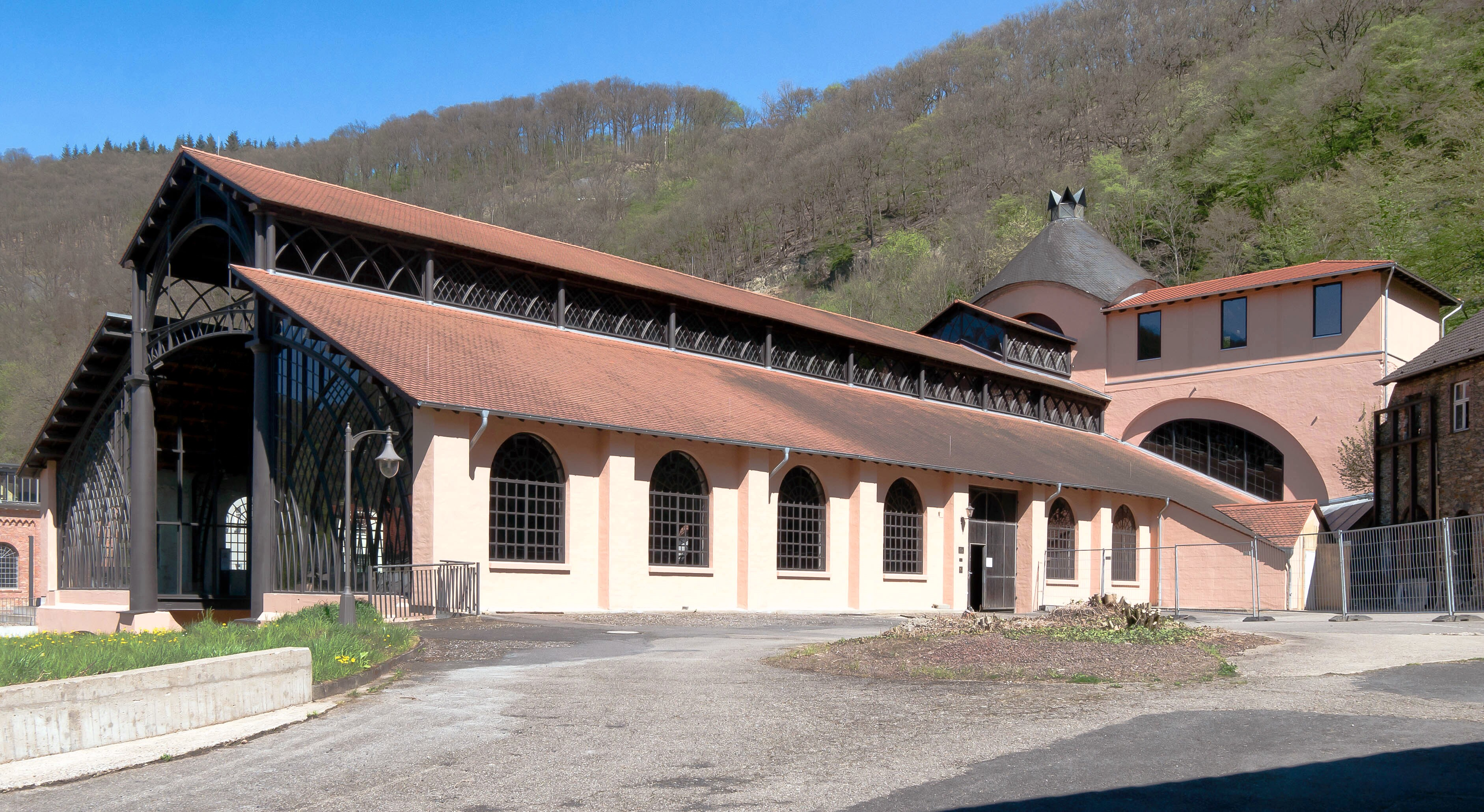 Gießhalle nach der Restaurierung